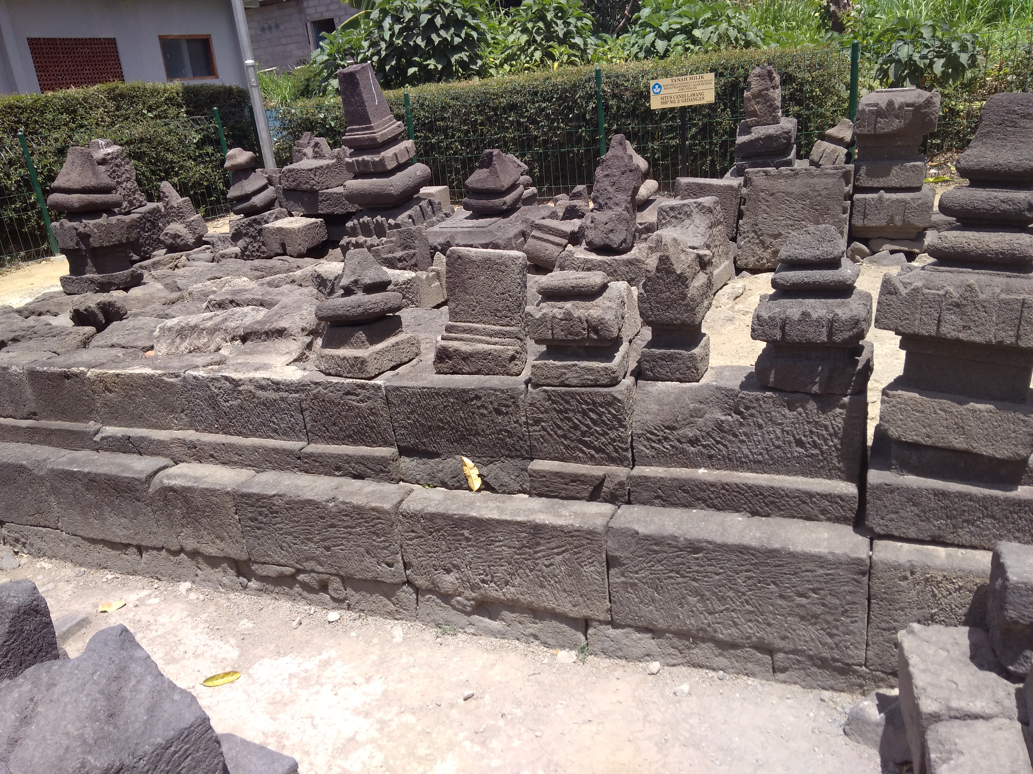 Deretan kemuncak di reruntuhan Candi Lawang